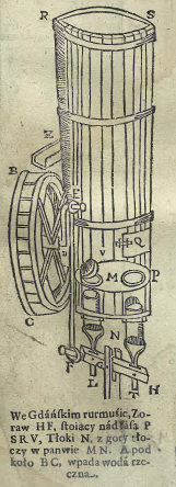 Rycina z Stanisława Solskiego, Architekt Polski, 1690